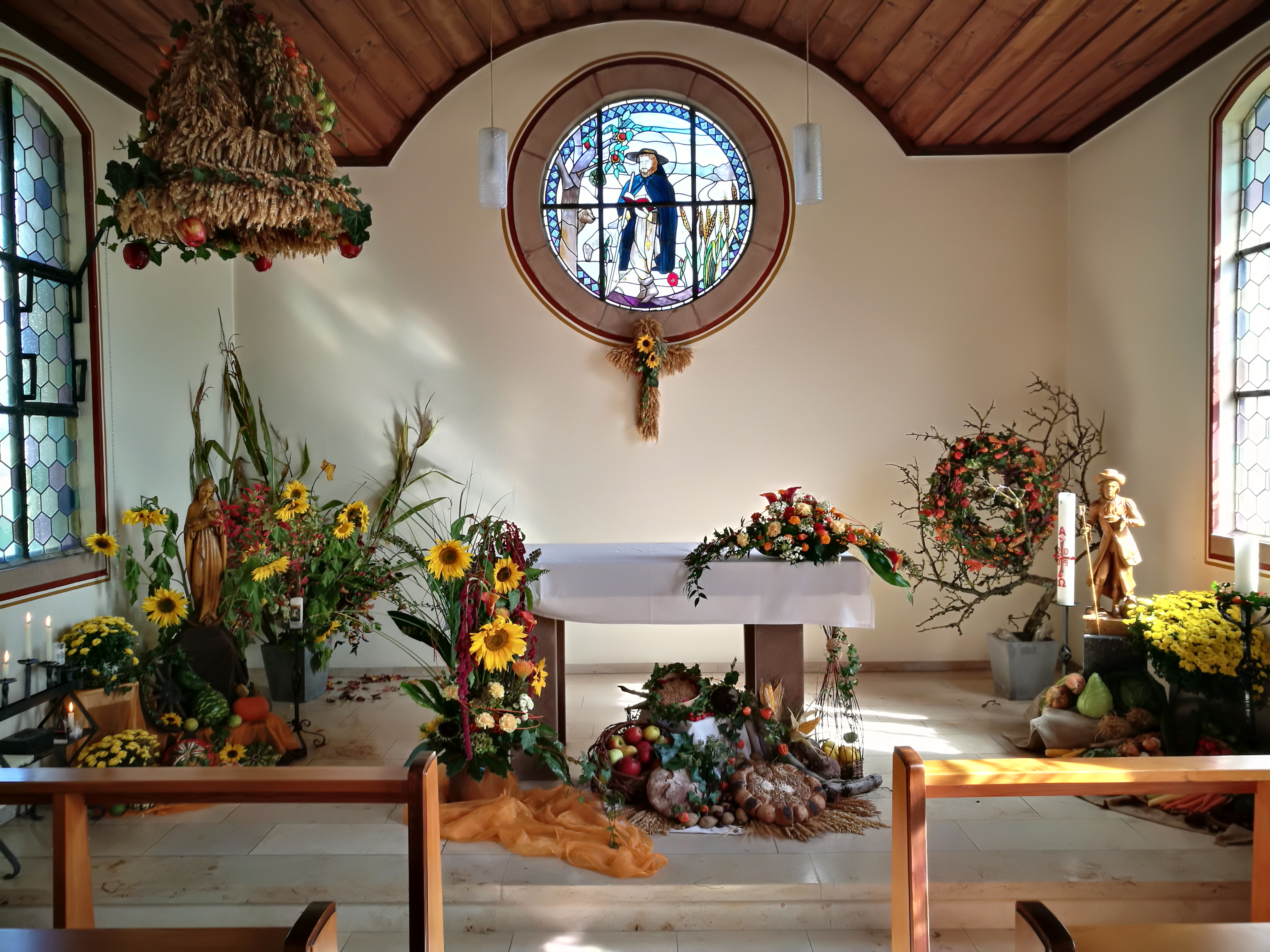 Deutschland (D) - Baden-Württemberg (BW) - Landkreis Konstanz (KN) - Mühlingen, Ortsteil Hecheln: St. Wendelin-Kapelle - Innenraum zum Erntedankfest 2017 geschmückt